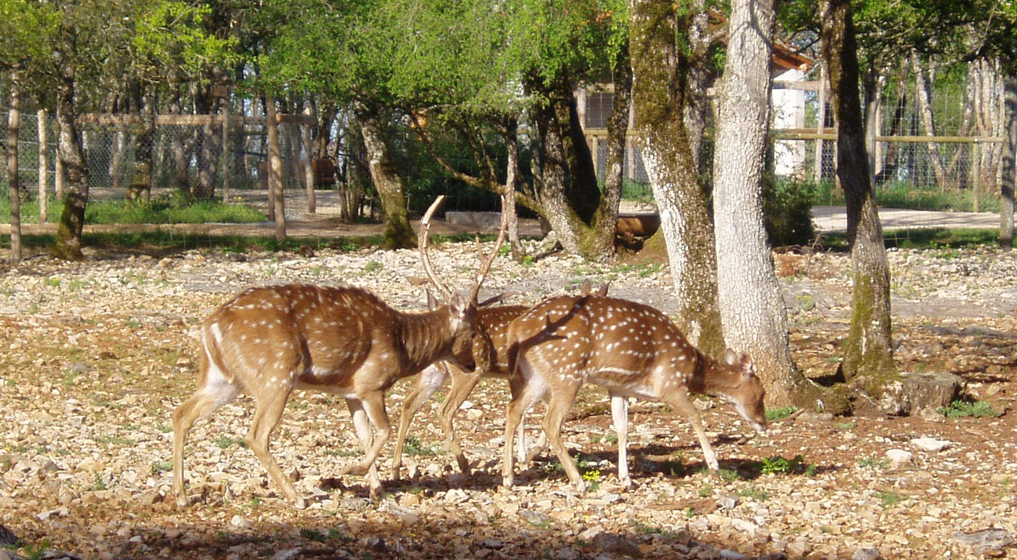 Axis axis, cerf axis / chital deer, parc animalier de Gramat (Lot) / Gramat animal parc (Lot, France)